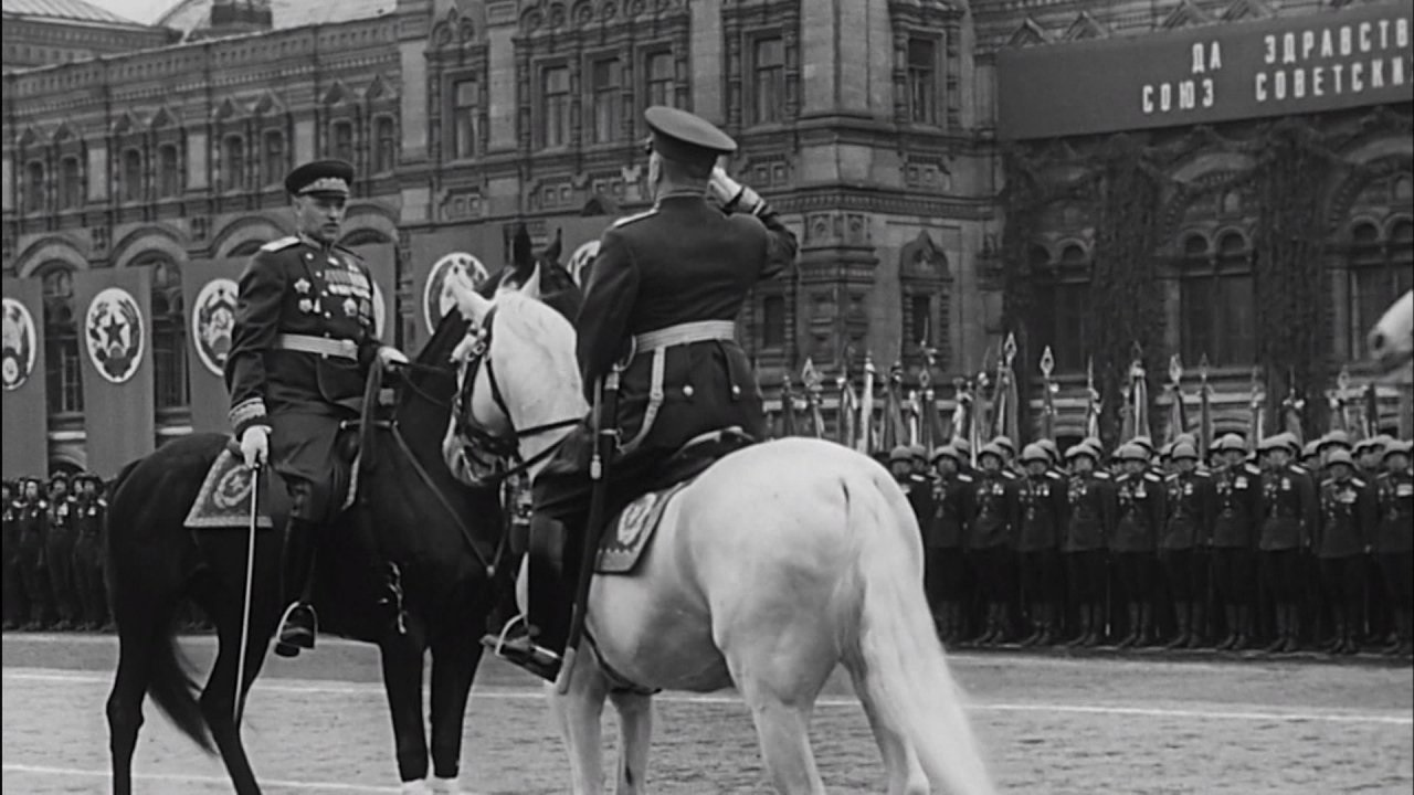 Парад Победы на Красной площади в Москве. Доклад командующего парадом Маршала Советского Союза К.К. Рокоссовского принимающему парад Маршалу Советского Союза Г.К. Жукову